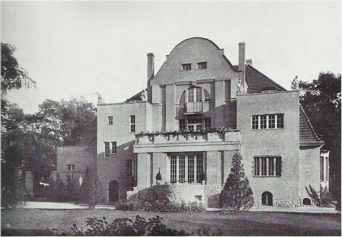 Haus Tettau I (Privathaus Wilhelm Freiherr von Tettau), Berlin-Lankwitz: Gartenfront